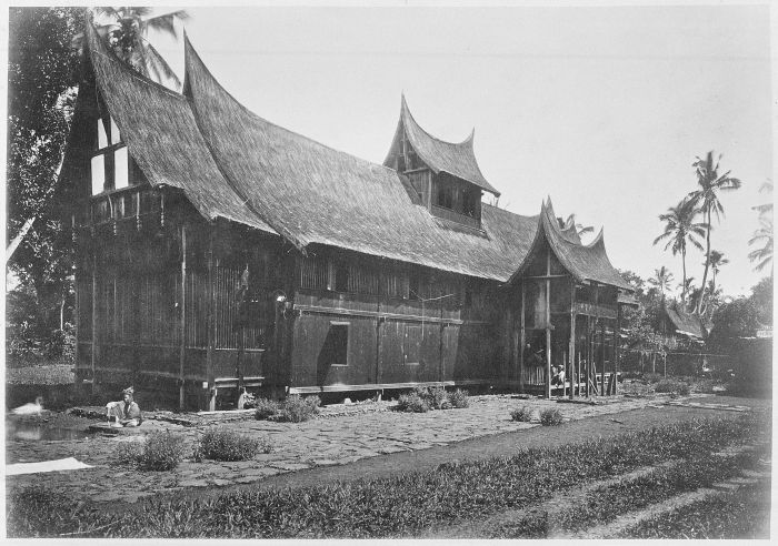 Foto. Deze foto is gemaakt tijdens de Sumatra Expeditie van 1877-1879. Landschappen uit de Padangsche Bovenlanden.. Het adathuis van Katieb Negri te Soepajang, Padangse Bovenlanden, Sumatra`s Westkust